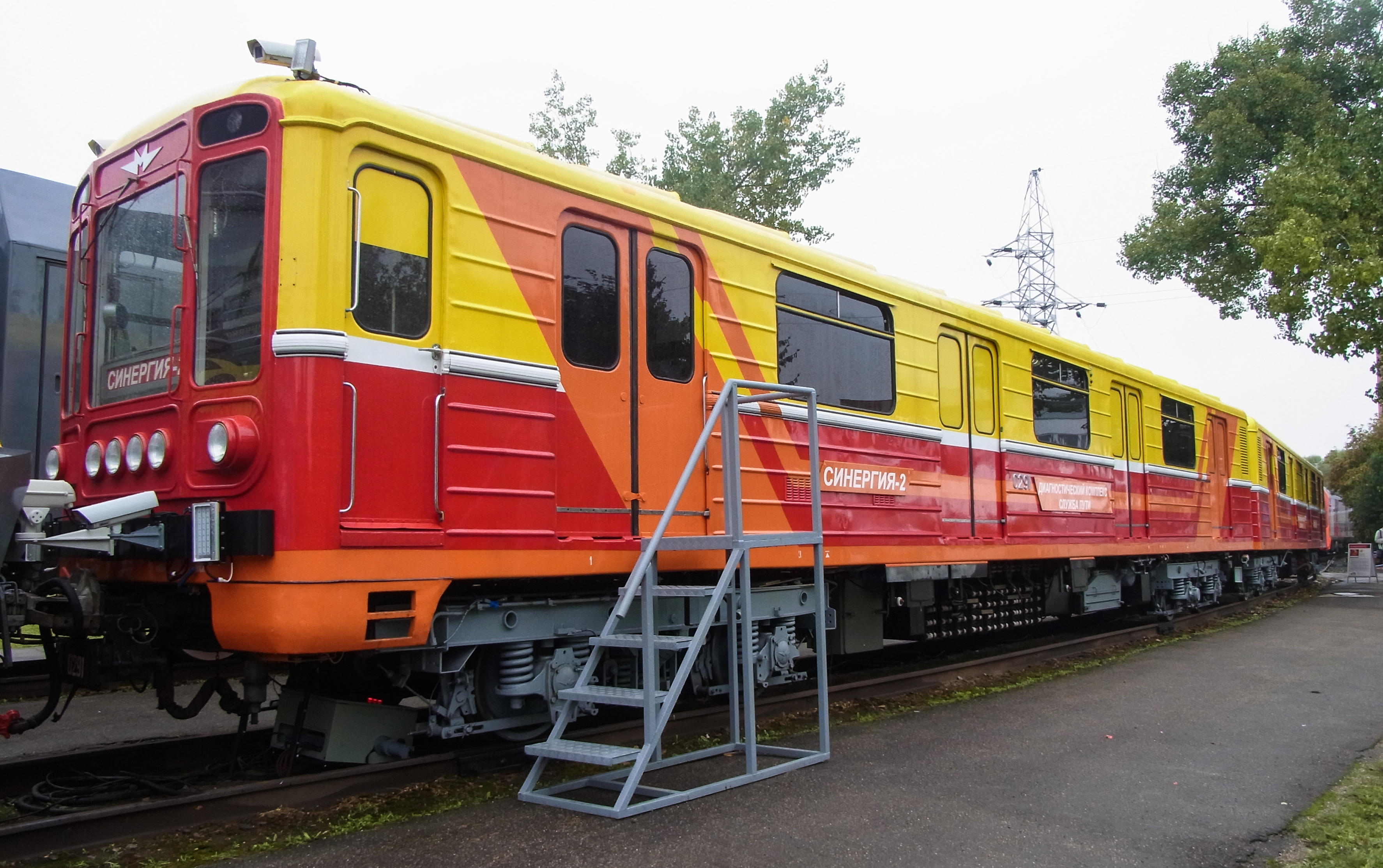 Диагностические вагоны поезда Синергия-2 на выставке Экспо-1520 на территории депо кольца ВНИИЖТ